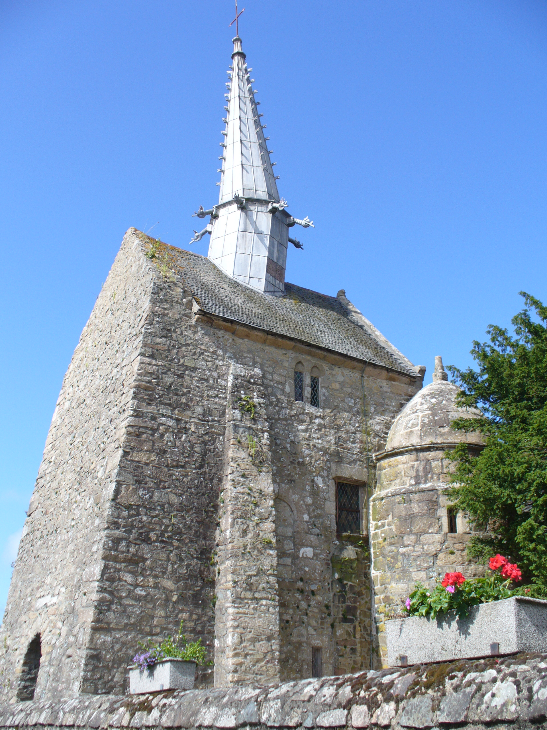 Chapelle Saint-Gonéry - Die bleiummantelte Holzspitze(1612) des romanischen Glockenturms mit seinen Dämonen abschreckenden Wasserspeihern neigt sich unter seiner schweren Last. Plougrescant - Côtes-d'Armor - (Côte de Granit) - Bretagne